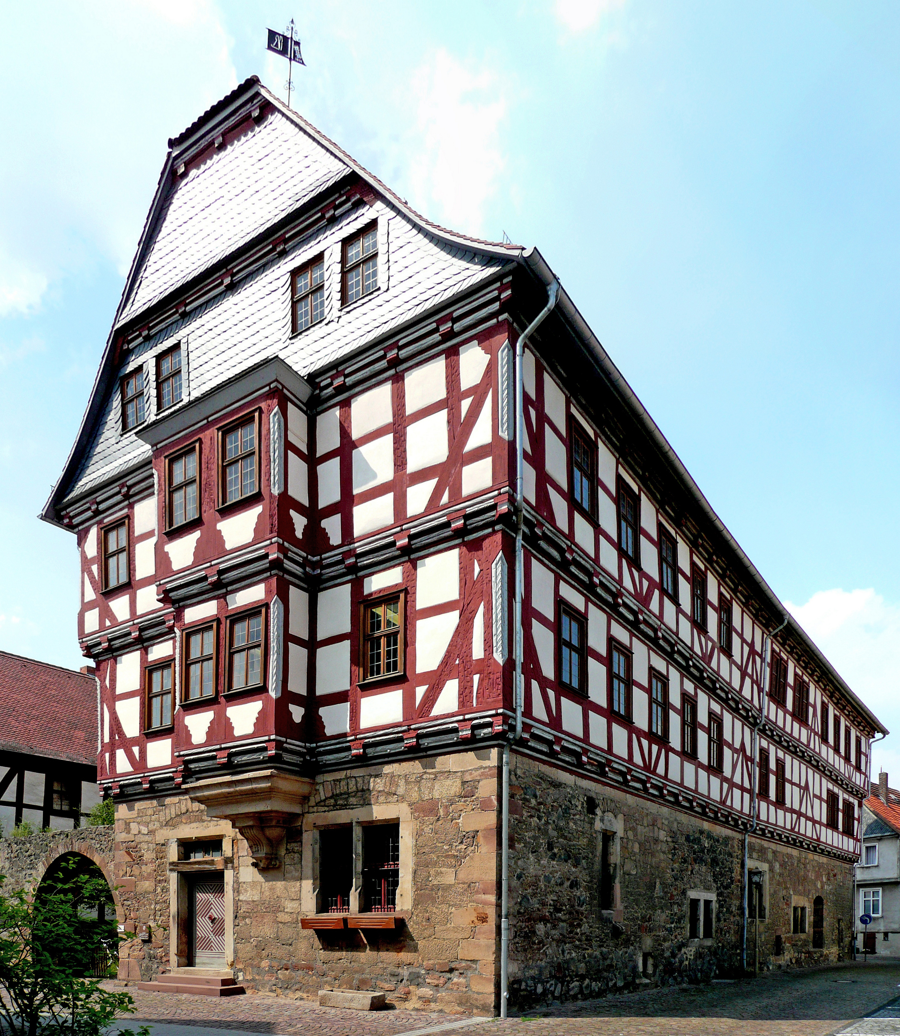 Hochzeitshaus (erbaut um 1580/90) in Fritzlar, Ansicht von Südosten (Panorama). This is a photograph of an architectural monument.